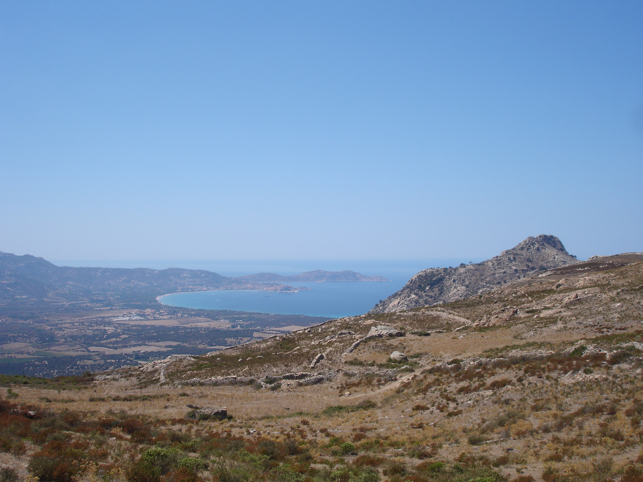 France, Haute-Corse (2B), baie de Calvi, Bocca di Silva